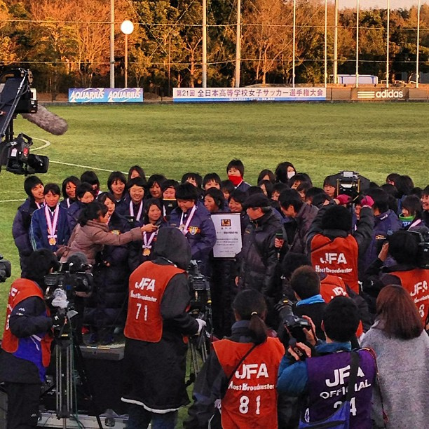 なでしこの蕾のアツイ戦いが終わりました。